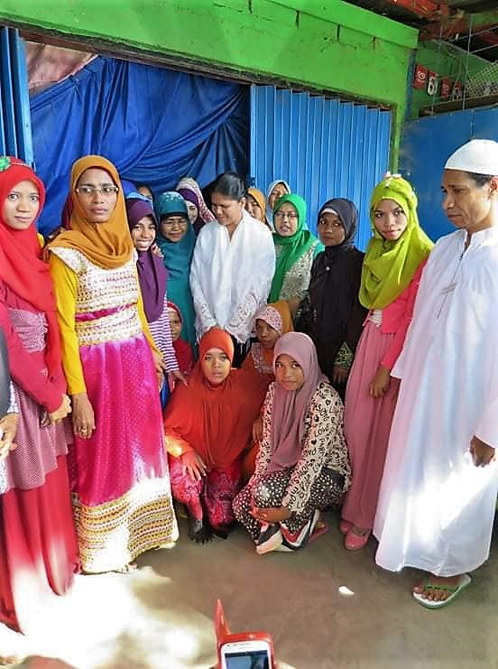 Muslime beim Zuckerfest in Osttimor